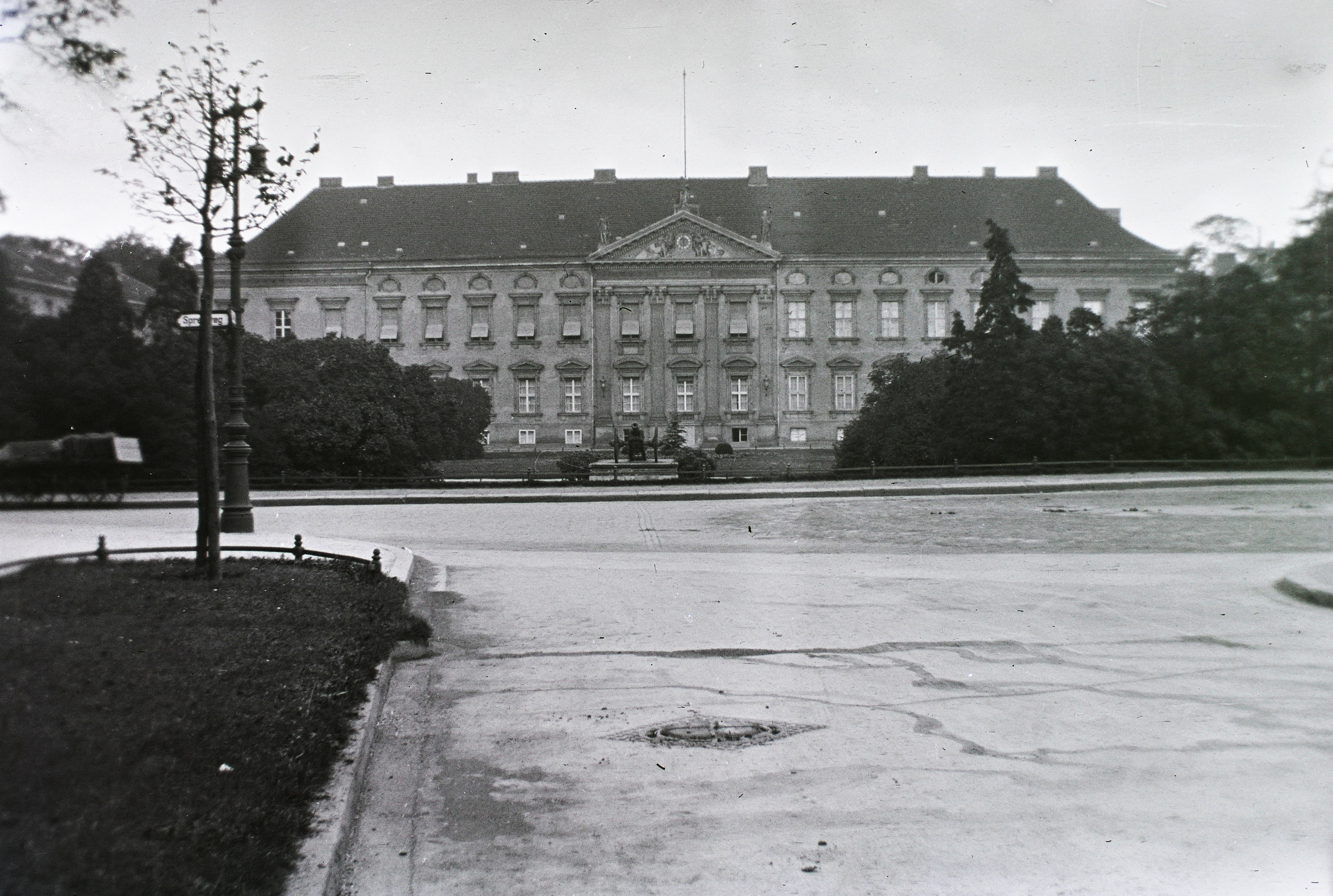 Tiergarten, Schloss Bellevue a Spreeweg felől nézve Location: Germany, Berlin Tags: castle Title: Tiergarten, Schloss Bellevue a Spreeweg felől nézve